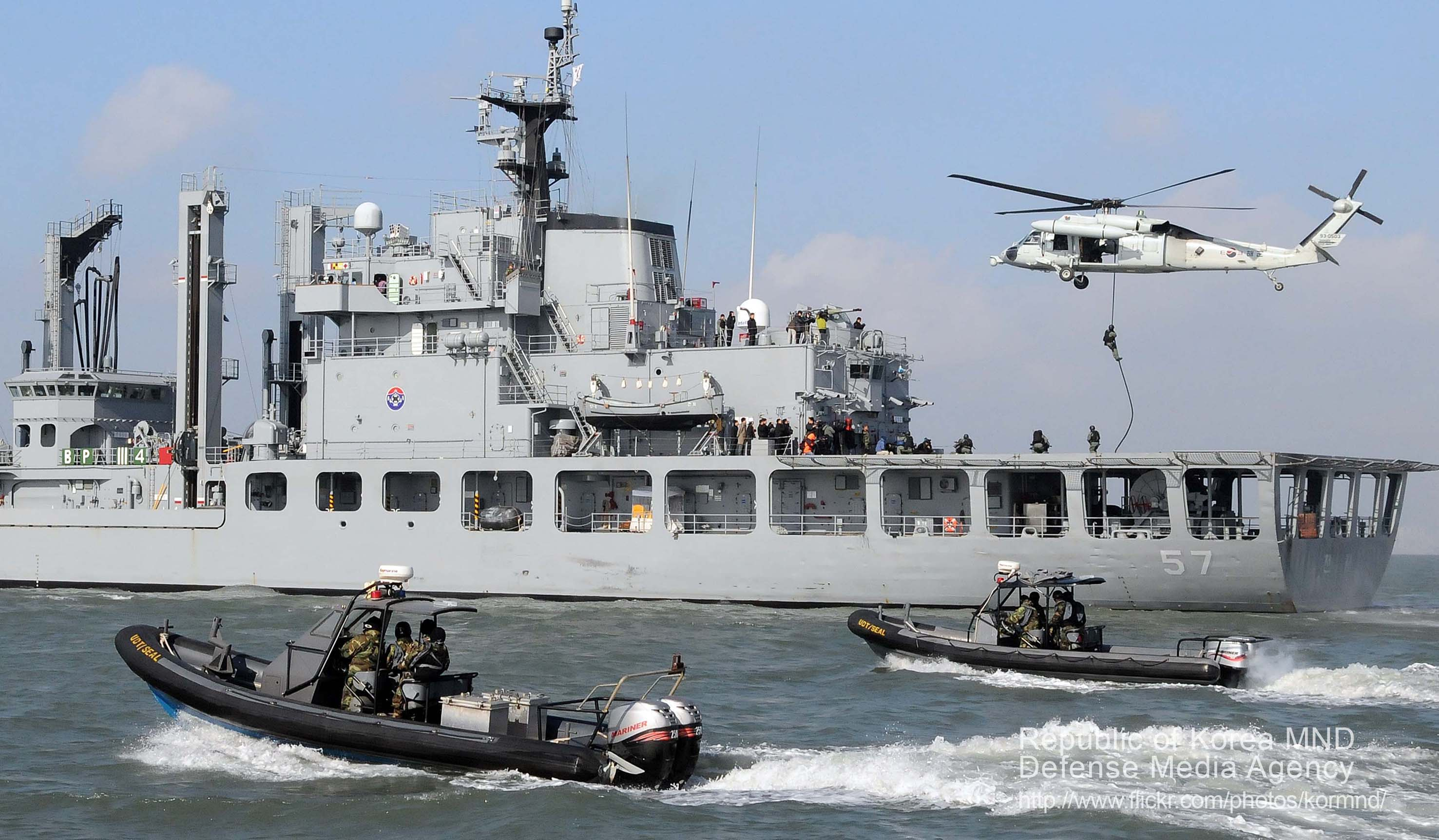 2011 국방화보 Rep. of Korea, Defense Photo Magazine 해군2함대 특수전요원(UDT/SEAL)들이 탑승한 고속단정과 UH-60 헬기가 피랍 상선 역할을 하고 있는 '천지 함'에서 테러 진압에 나서고 있다.